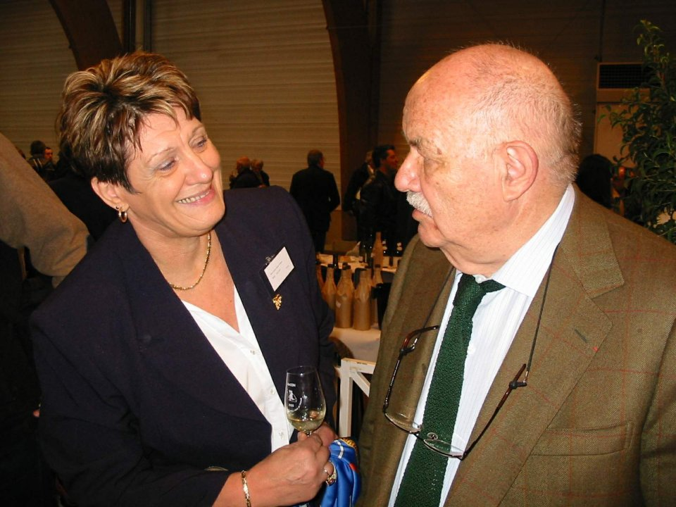 Le chef cuisinier Pierre Troisgros et Madame Grappe, présidente de l'Association des Oenophiles et Dégustateurs du Jura. A un concours d'oeunologie Bourgignon en 2005